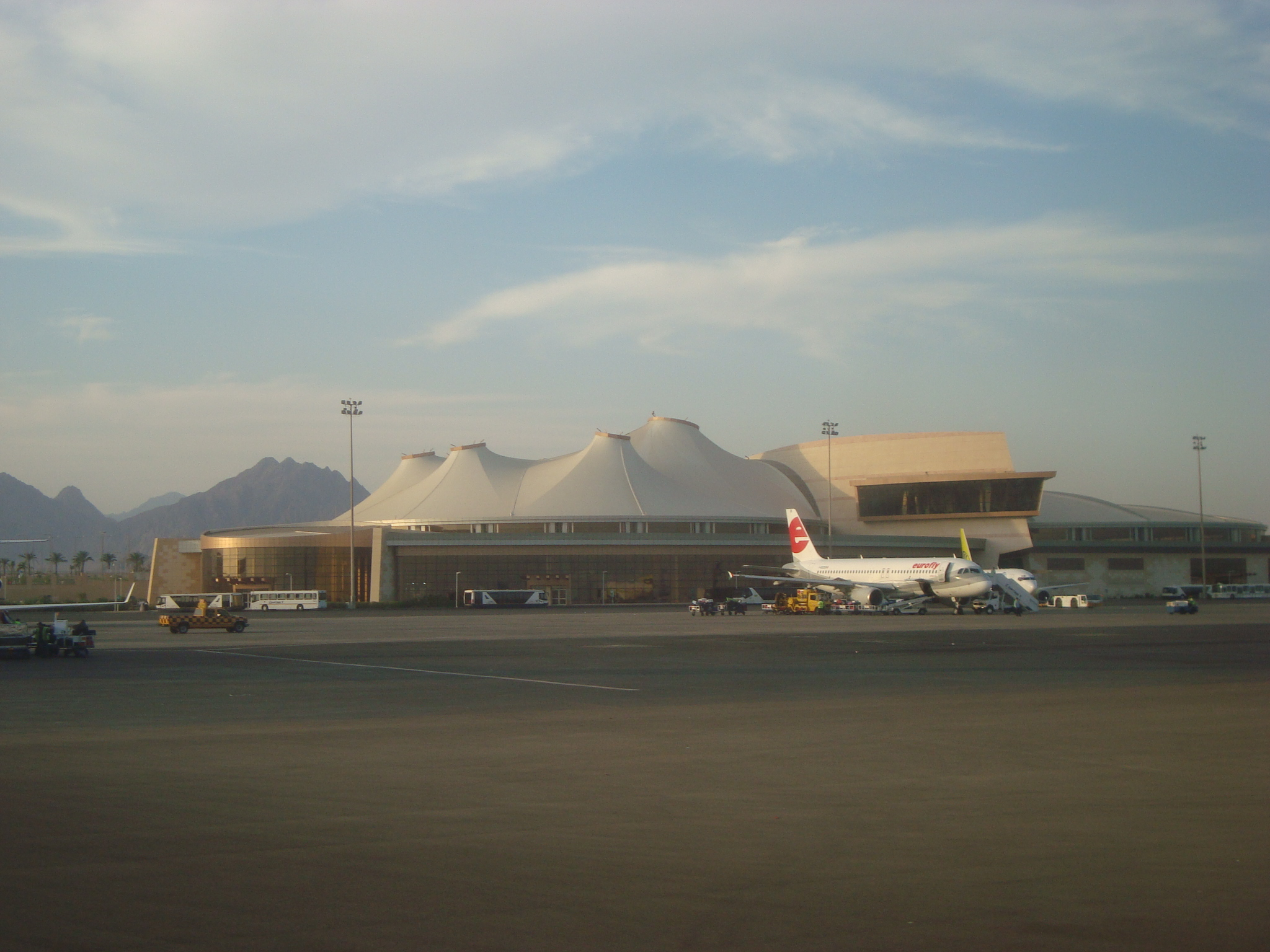 Аеропорт у м. Шарм-ель-Шейх, Єгипет